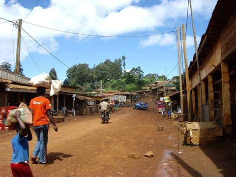 Avenue principaple ou marché Bangang, Cameroun.